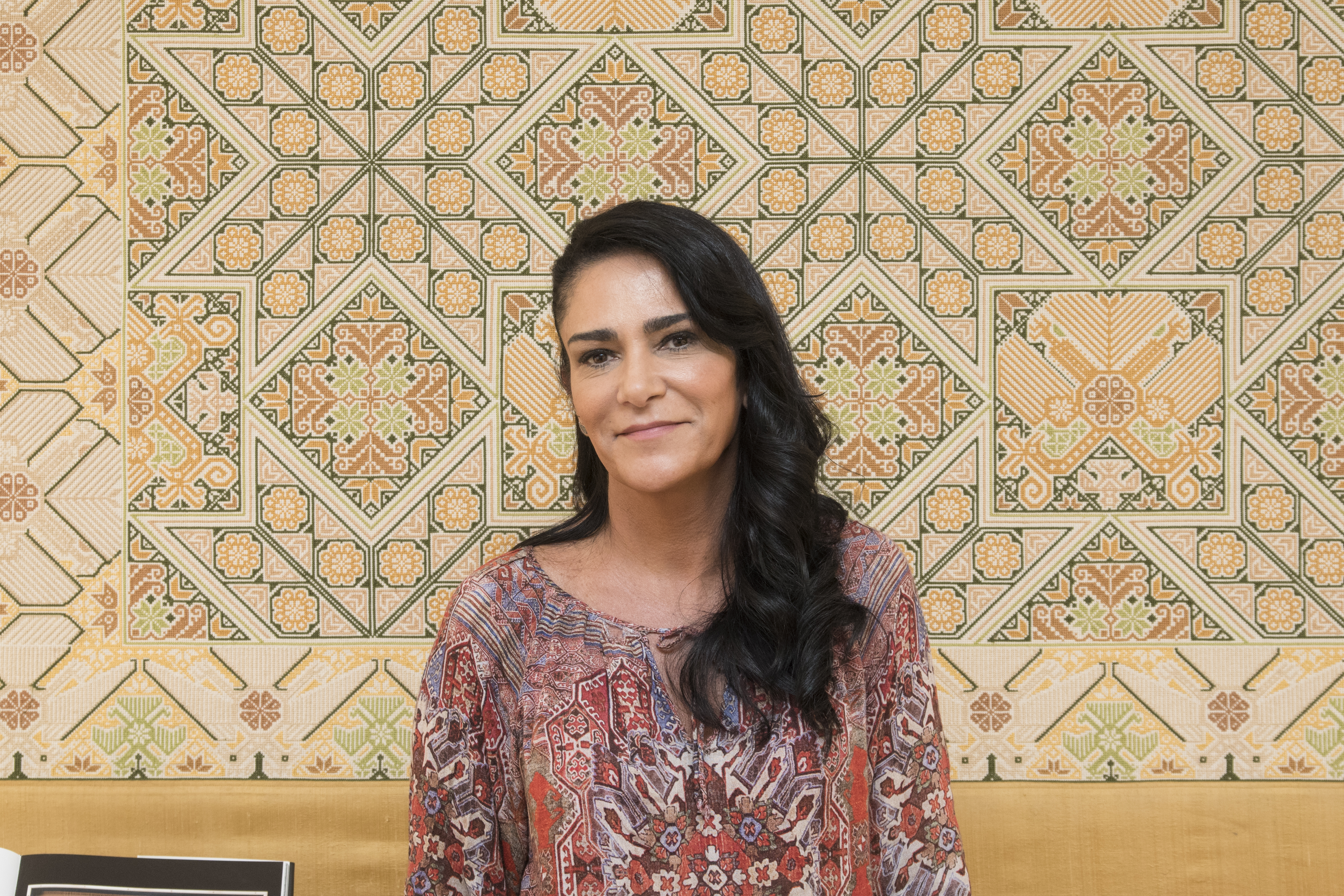 La periodista y escritora Lydia María Cacho Ribeiro